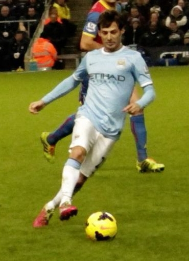 David Silva lors du match Manchester City - Crystal Palace le 28 décembre 2013